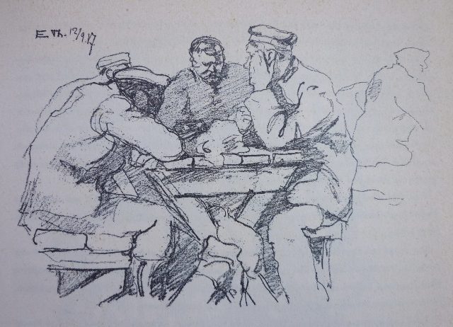 Titel: Kriegsgefangene. Kohlezeichnung auf Papier. Maße: Unbekannt